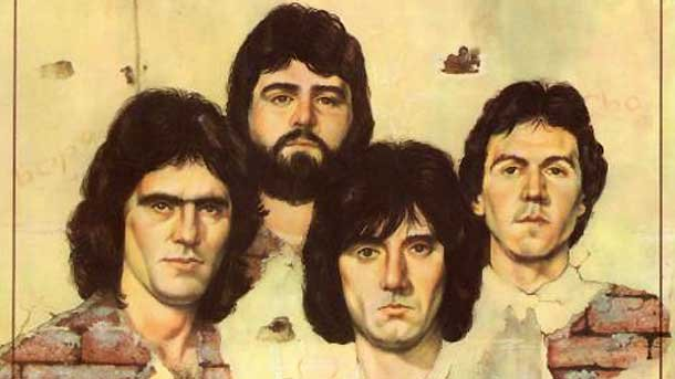 Емил Герасимов, Цветан Владовски, Борислав Цонев, Константин Марков